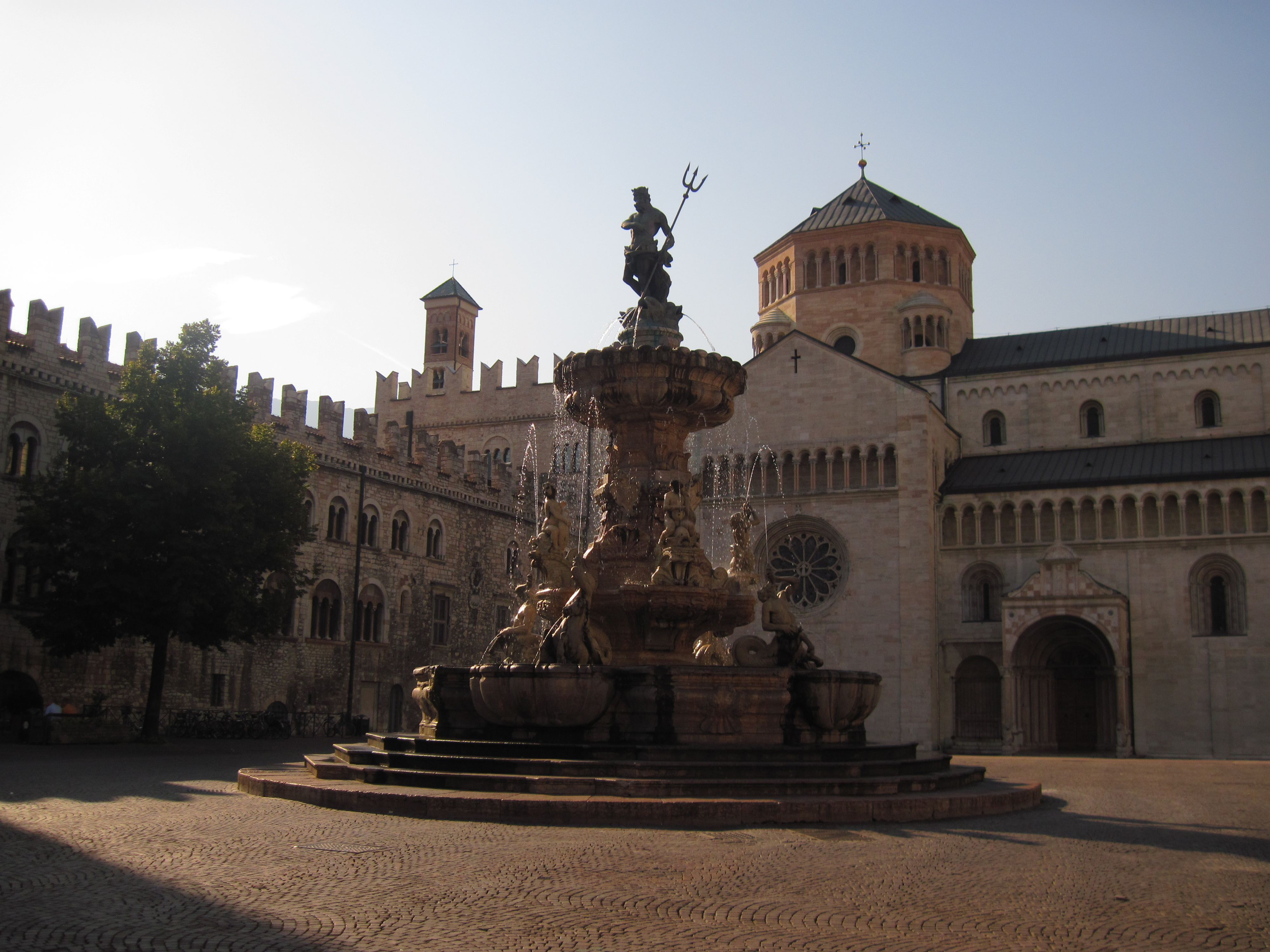 Cattedrale di San Vigilio, Palazzo Pretorio e Fontana del Nettuno a Trento This is a photo of a monument which is part of cultural heritage of Italy. This is a photo of a monument which is part of cultural heritage of Italy.